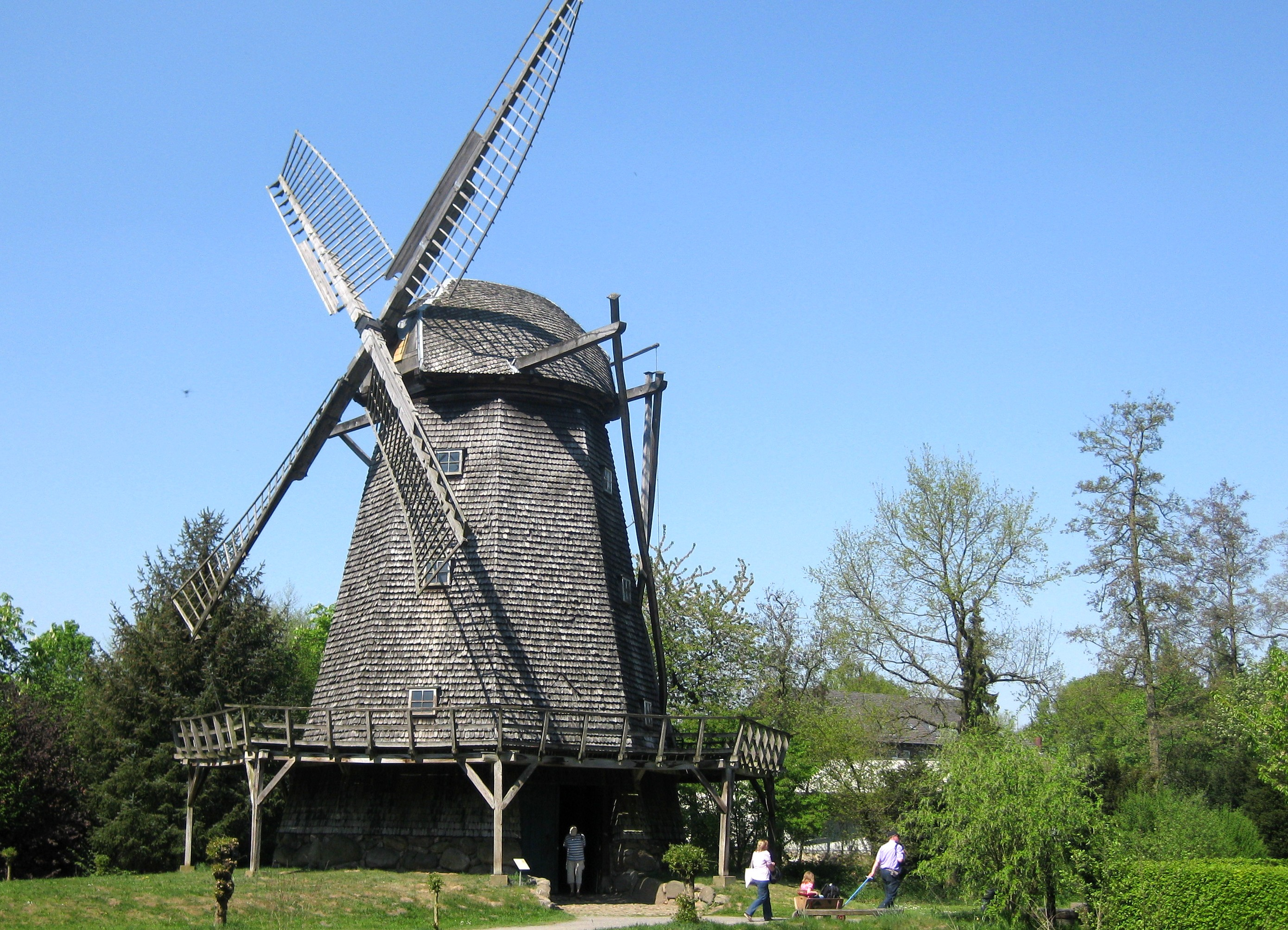 Kappenwindmühle im Museumsdorf Cloppenburg